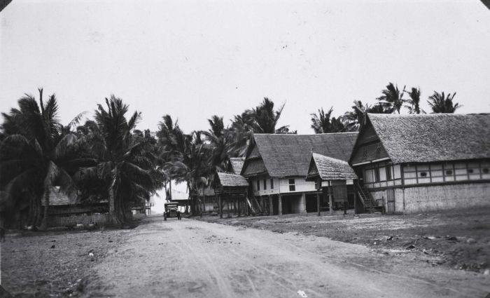 Foto. Weg door kampong, Bima